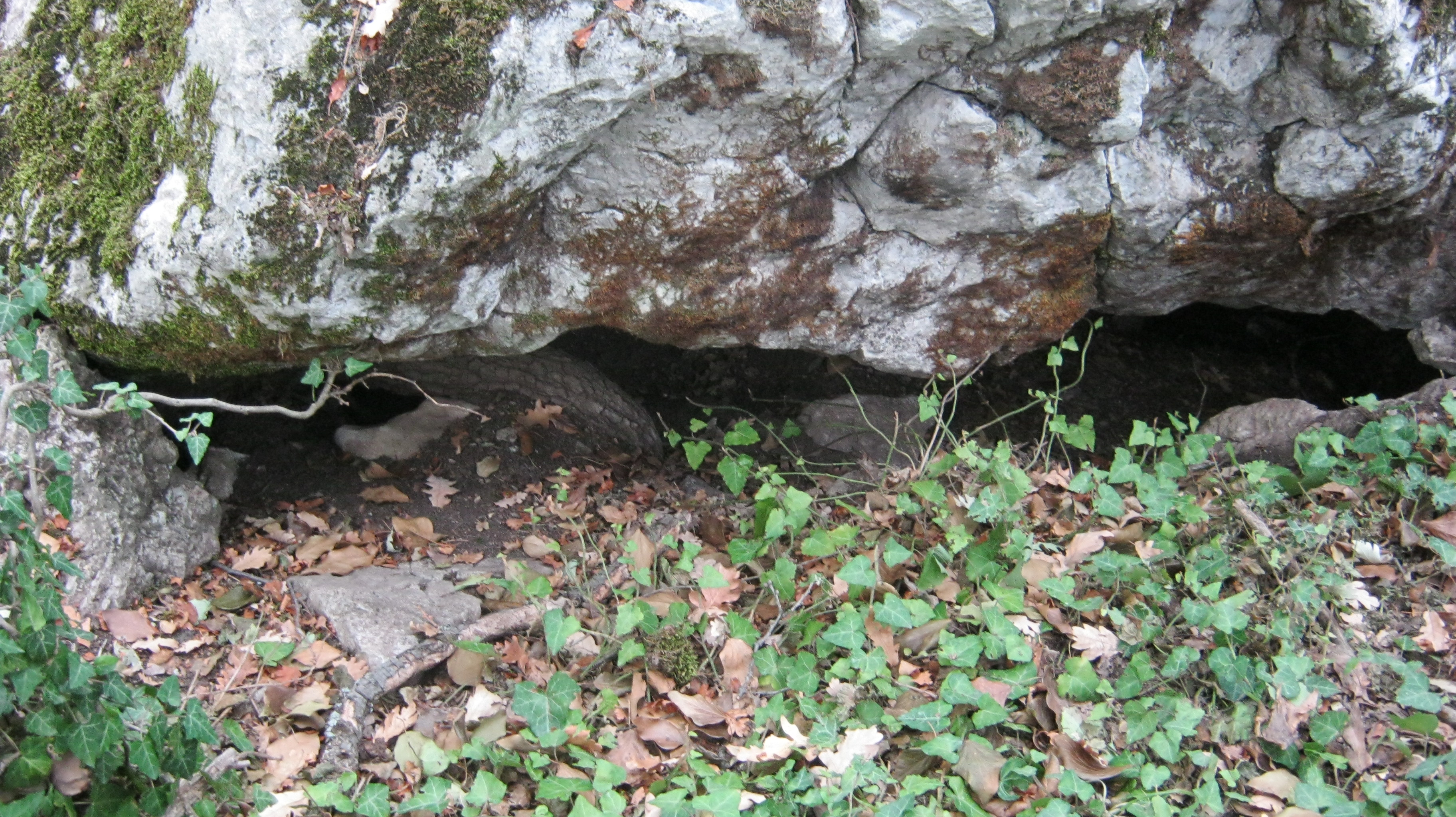 Српски (ћирилица): Мала пећина на Гледићким планинама